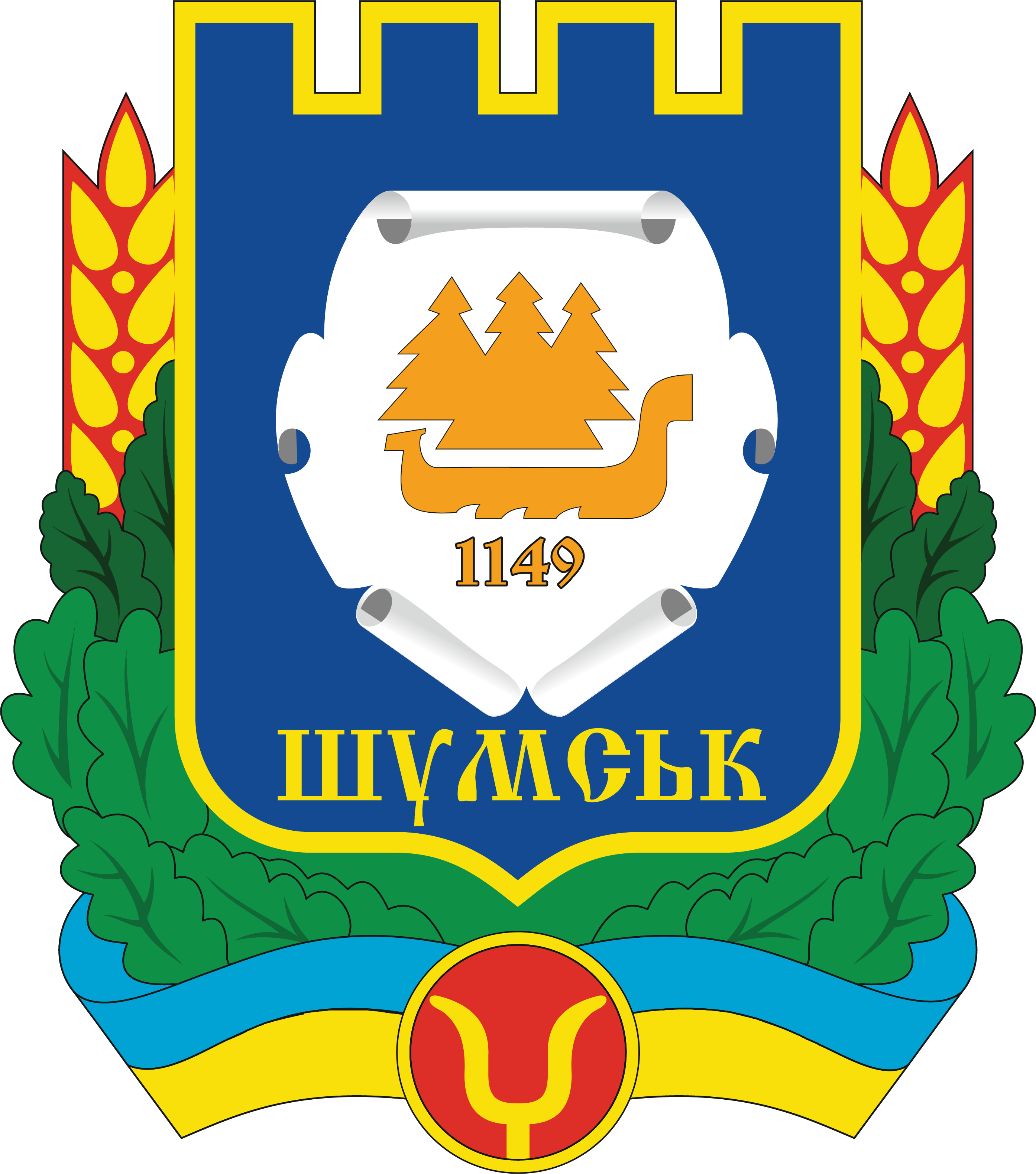 Герб Шумська